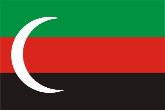 中華伊斯蘭共和國國旗是一個1930年代時，在寧夏建立之中國共和政體地方政權的旗幟。